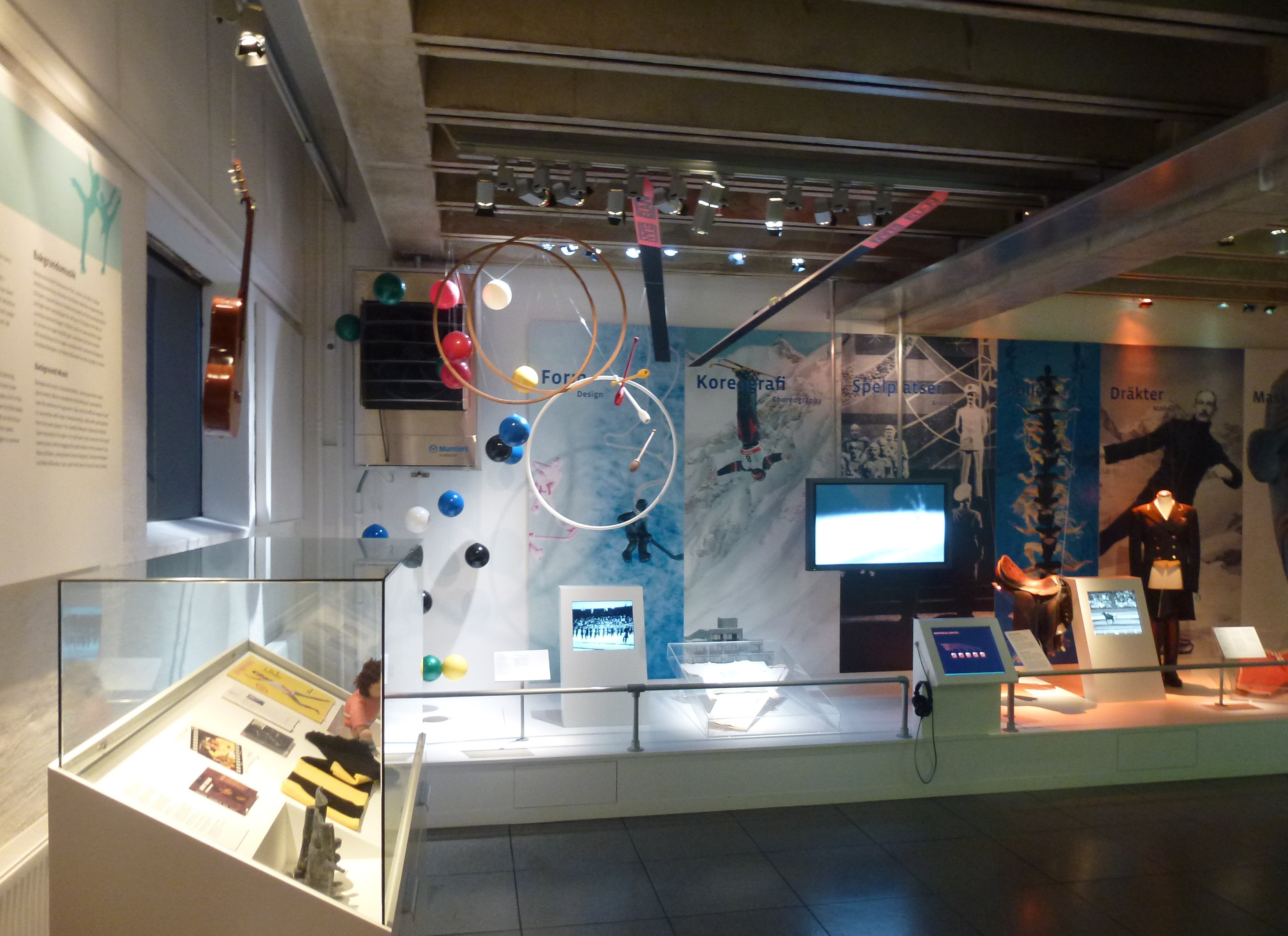 Riksidrottsmuseet